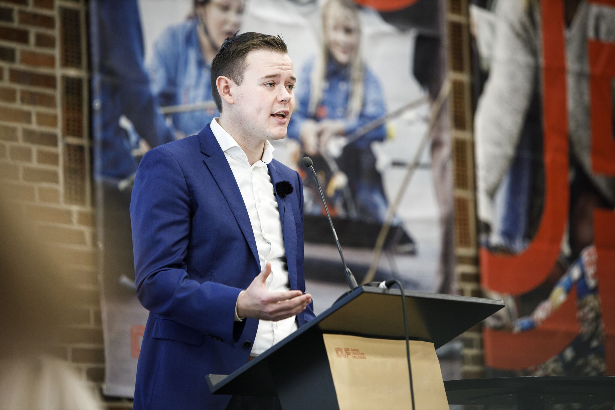 Chris Preuss